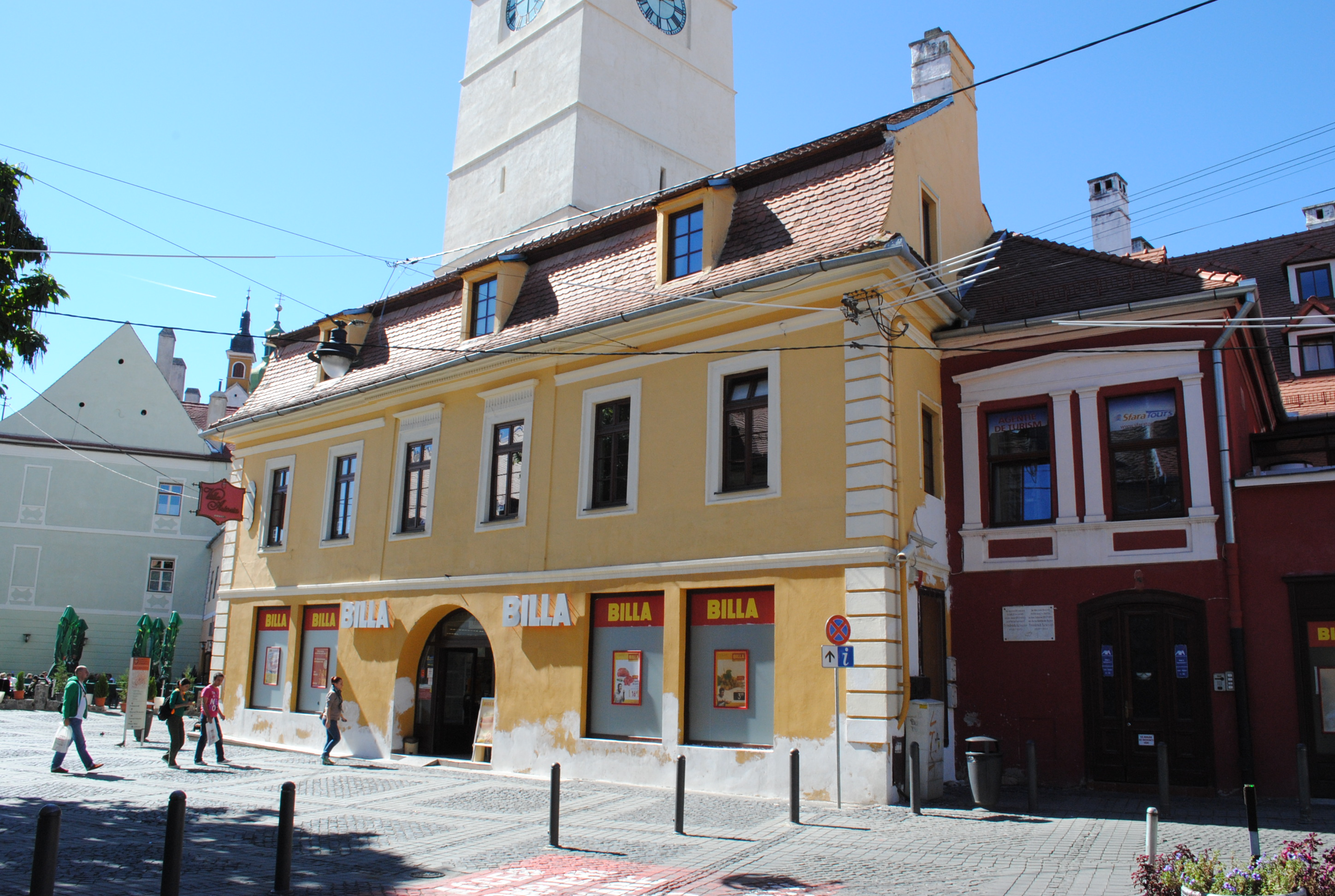 Casă (în corpul B fragmente din prima Primărie a orașului), sec. XIV, sf. sec. XV - înc. sec. XVI, 1742